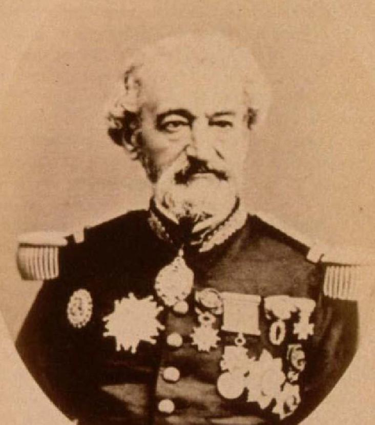 Titre : L'amiral Dupré, Marie-Jules Auteur : Meyer, Antoine. Photographe Éditeur : A. Meyer; Colmar!J.B. Jung et Cie (Colmar) Date d'édition : 1890 Sujet : Strasbourg Sujet : PORTRAIT, Dupré (Marie Jules) Type : image fixe Langue : Français Format : 22,5 x 14 cm ; 13,5 x 9,5 cm Format : image/jpeg Droits : domaine public Identifiant : ark:/12148/btv1b10201775b Source : Bibliothèque nationale et universitaire de Strasbourg, NIM02434 Relation : Description : Appartient à l’ensemble documentaire : BNUStr003 Provenance : bnf.fr Date de mise en ligne : 23/09/2013